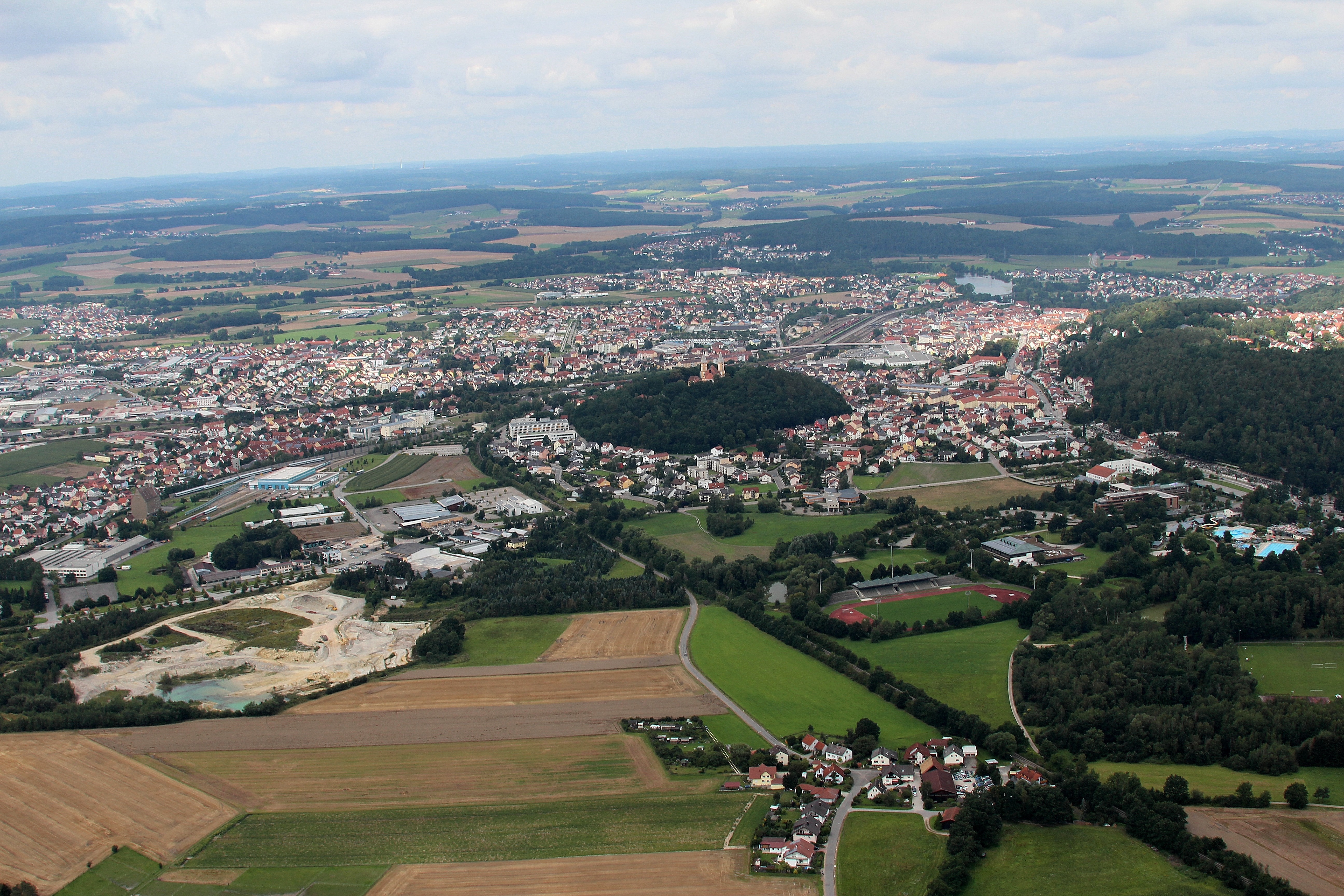 Blick auf Schwandorf; im Vordergrund der Ortsteil Natternoos, in der Bildmitte das Sepp-Simon-Stadion, dahinter der Kreuzberg: Landkreis Schwandorf, Oberpfalz, Bayern